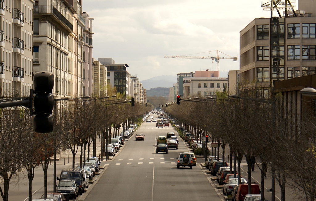 l'avenue Jean-Jaurès vers le sud à Gerland, Lyon (Rhône, Rhône-Alpes).